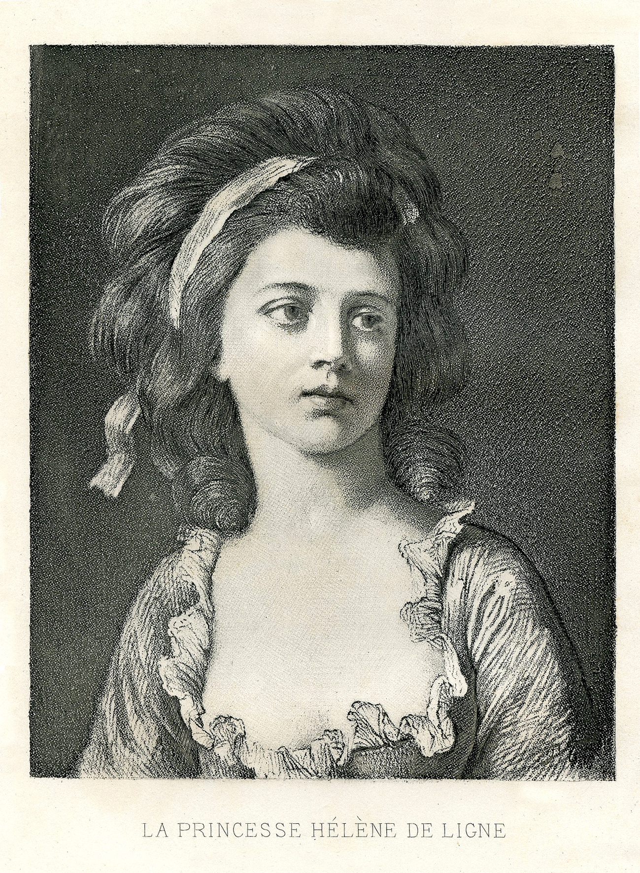 Portrait de la La princesse Hélène de Ligne, née Apolonia Helena Massalska Gravure d'après peinture, anonyme.